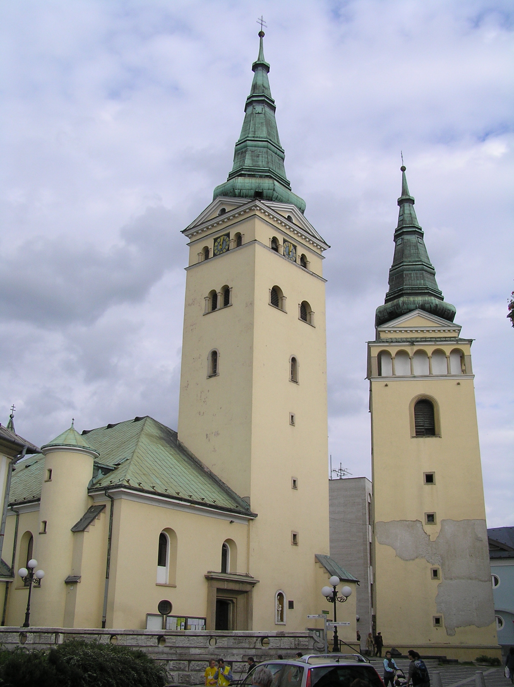 Žilina, Kostol Najsvätejšej Trojice a Burianova veža